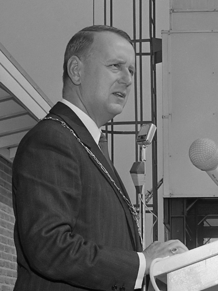 Burgemeester Stolk van Tiel asfaltfabrikagebedrijf geopen hier drukt hij op de knop 12 mei 1965